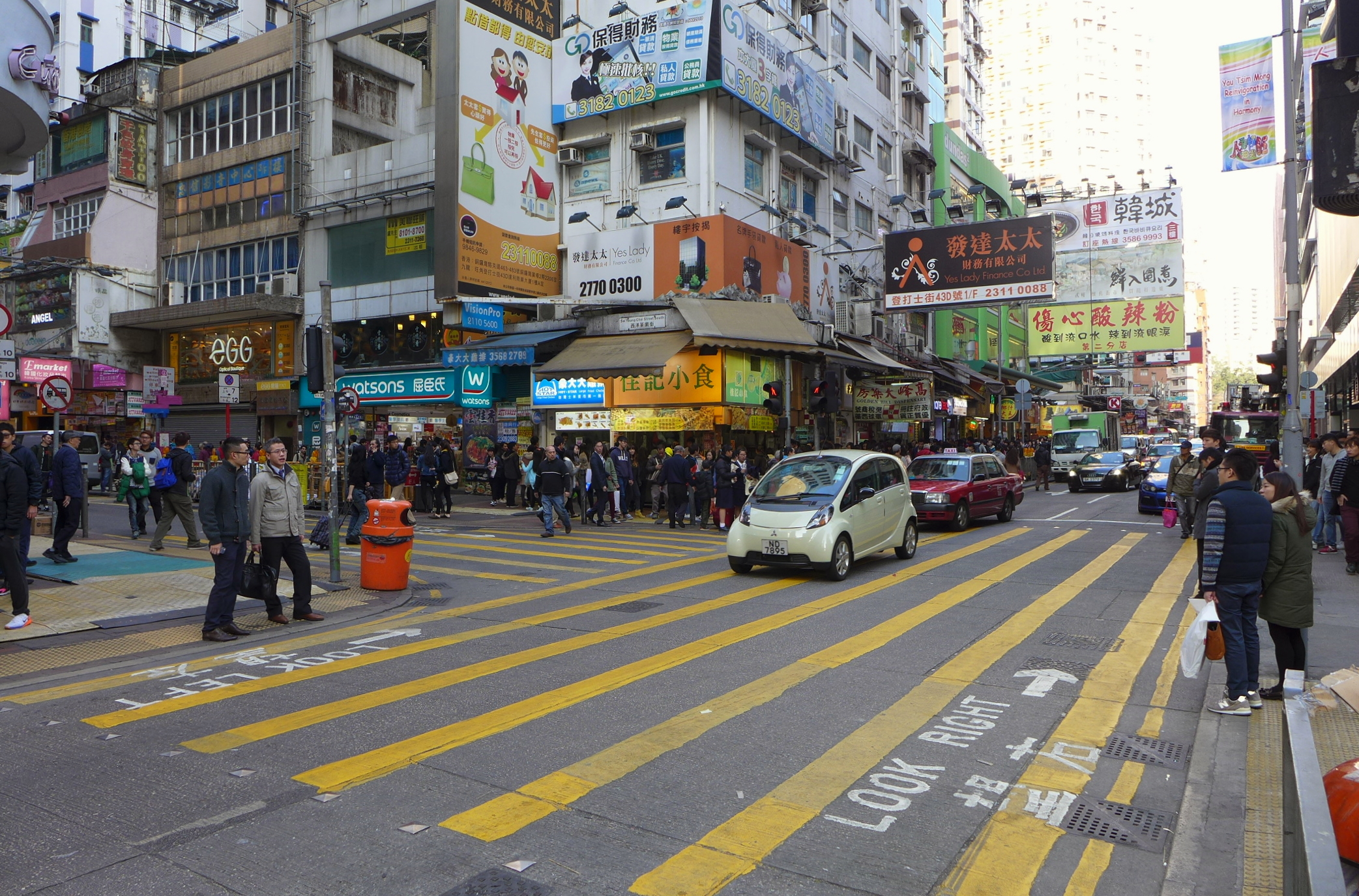 Dundas Street in Mong Kok